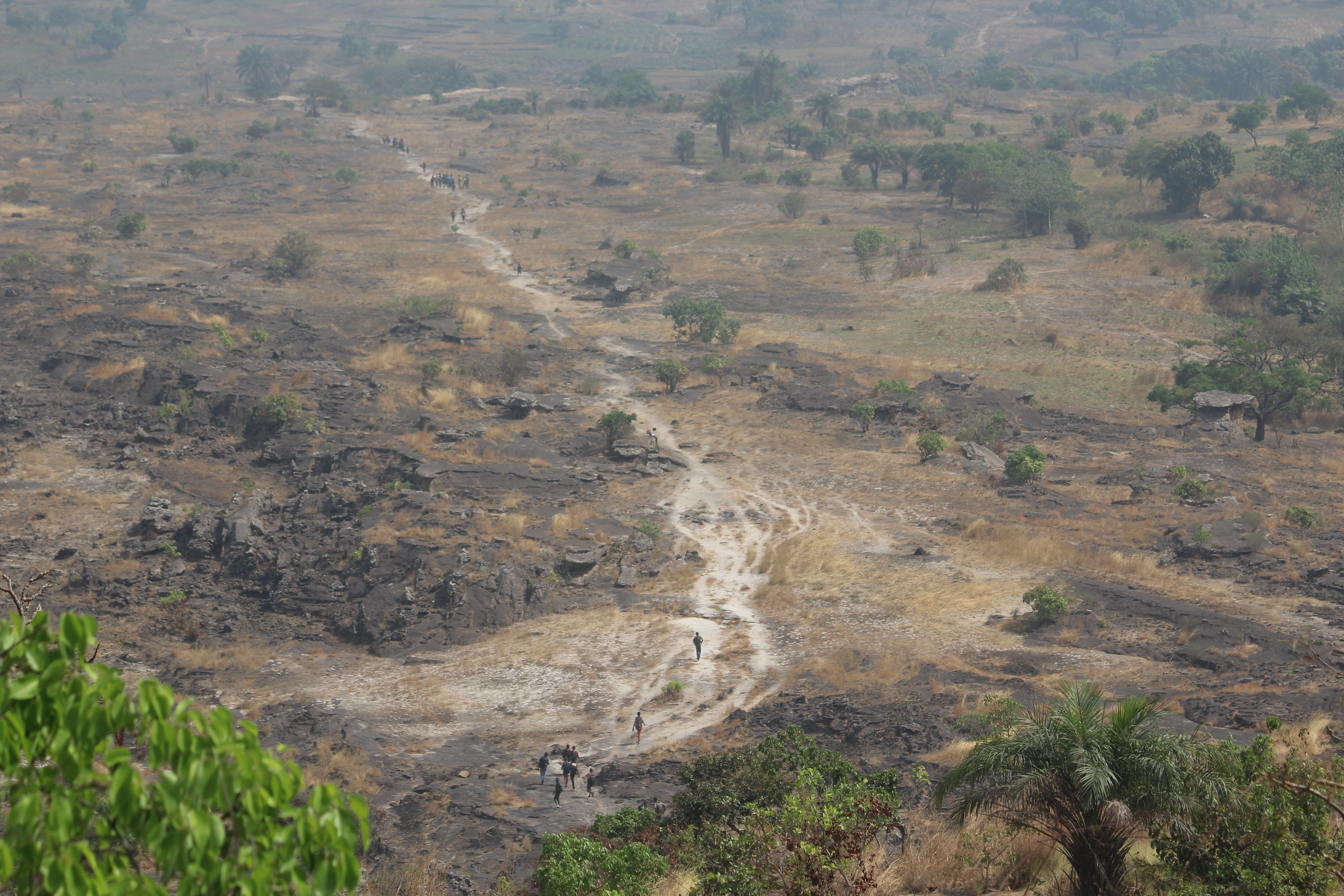 Chémin du Mont Gangan à kindia This is an image with the theme "Africa on the Move or Transport" from: Guinea